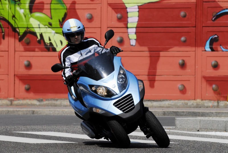 La sorella che fa il test allo scooter a tre ruote. Molto molto piacevole, dice.